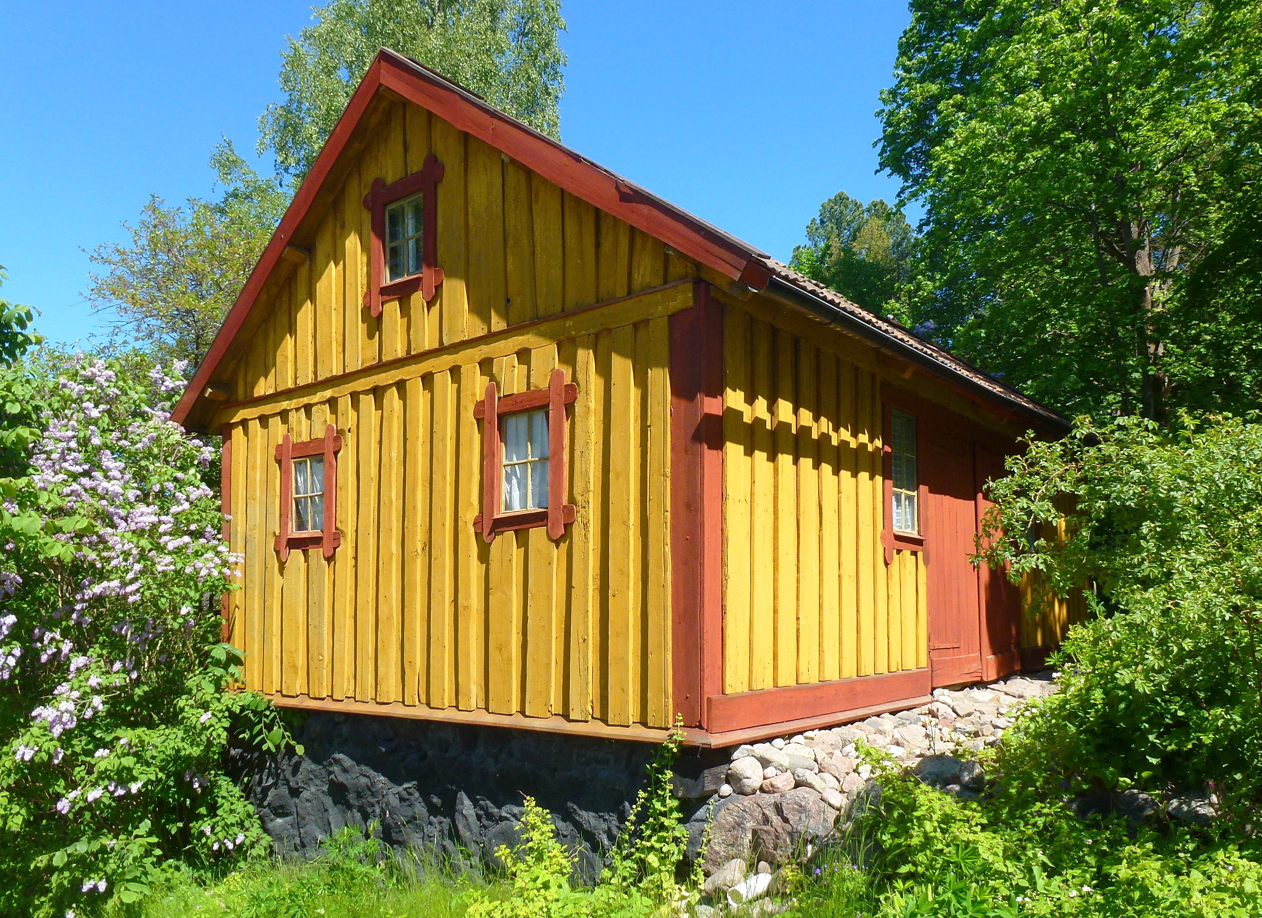 Villa Skuggan på Ulriksdals slottsområde (förråd)